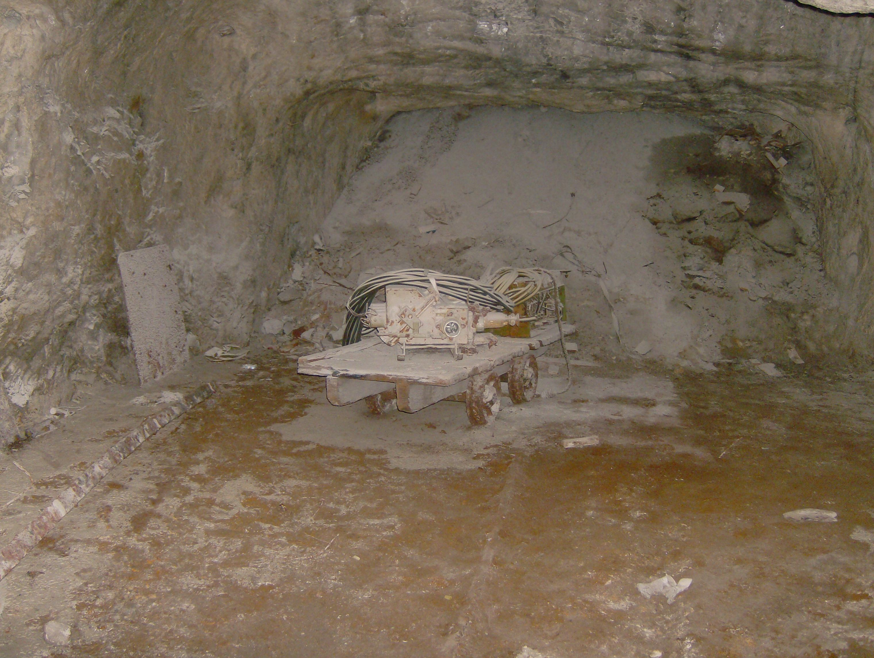 Alter Plattenwagen im Kali- und Steinsalzwerk Bartensleben in etwa 375 Meter Teufe